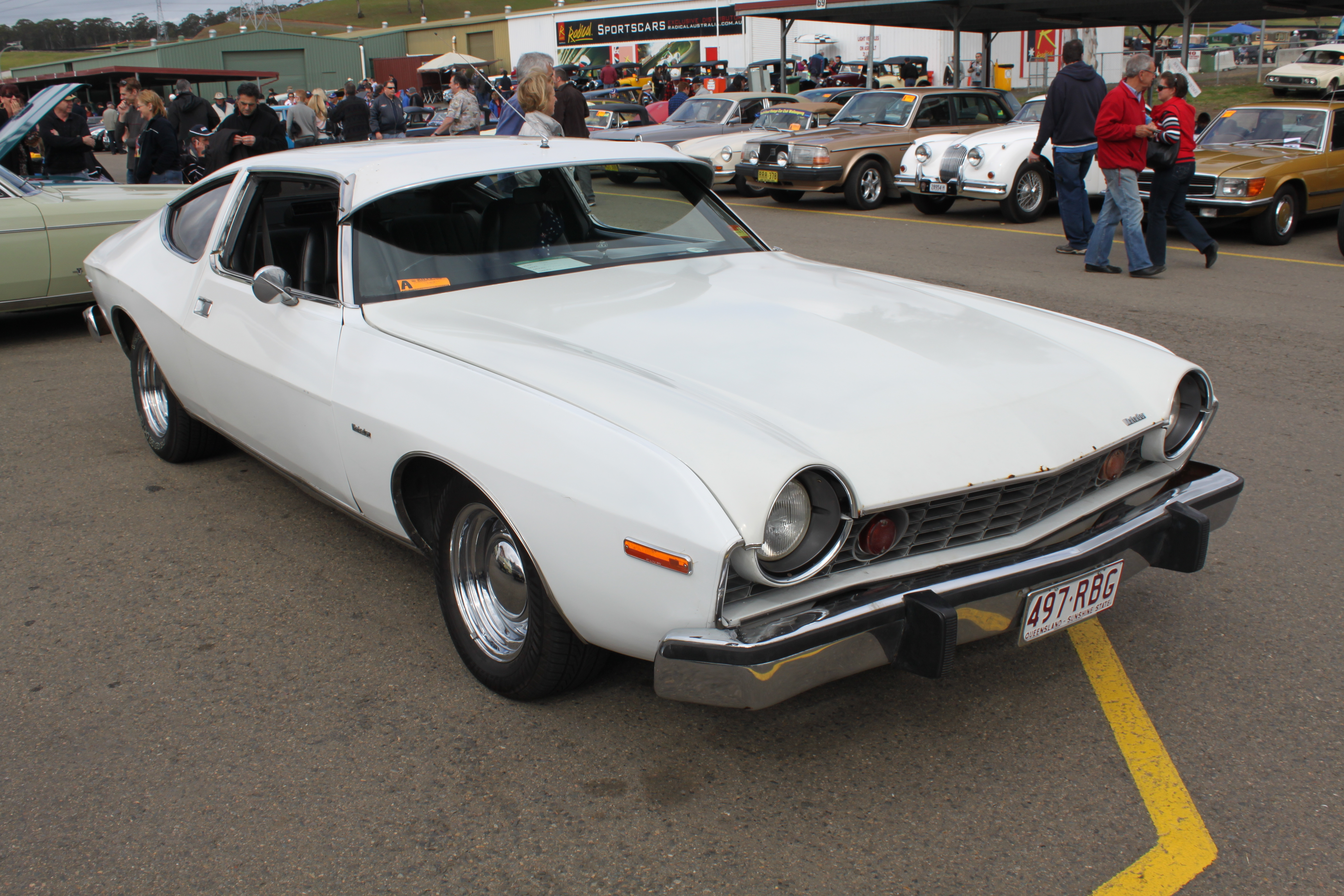 Rambler Matador X